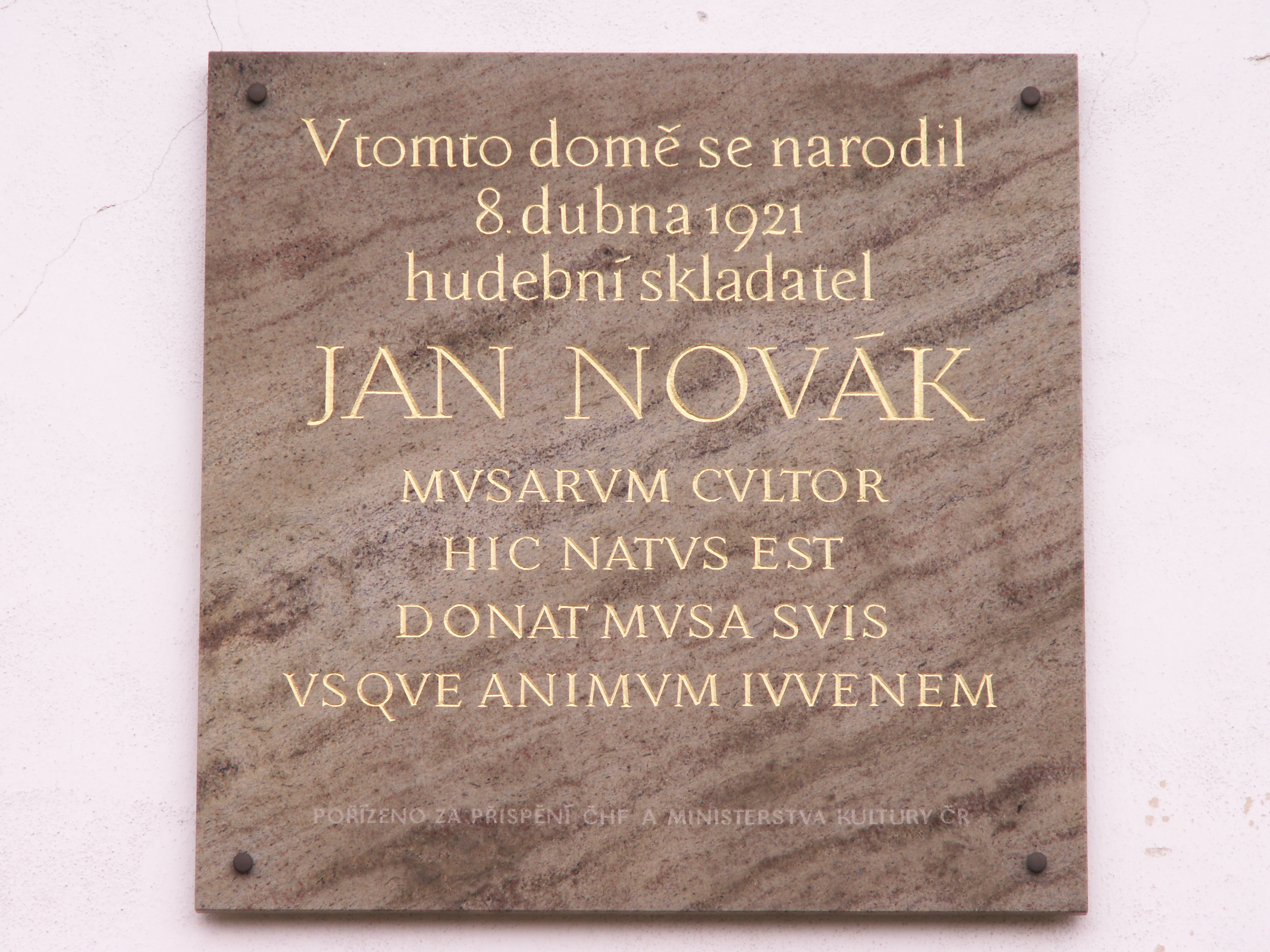 Nová Říše, náměstí, rodný dům skladatele Jana Nováka (1921-1984), pamětní deska